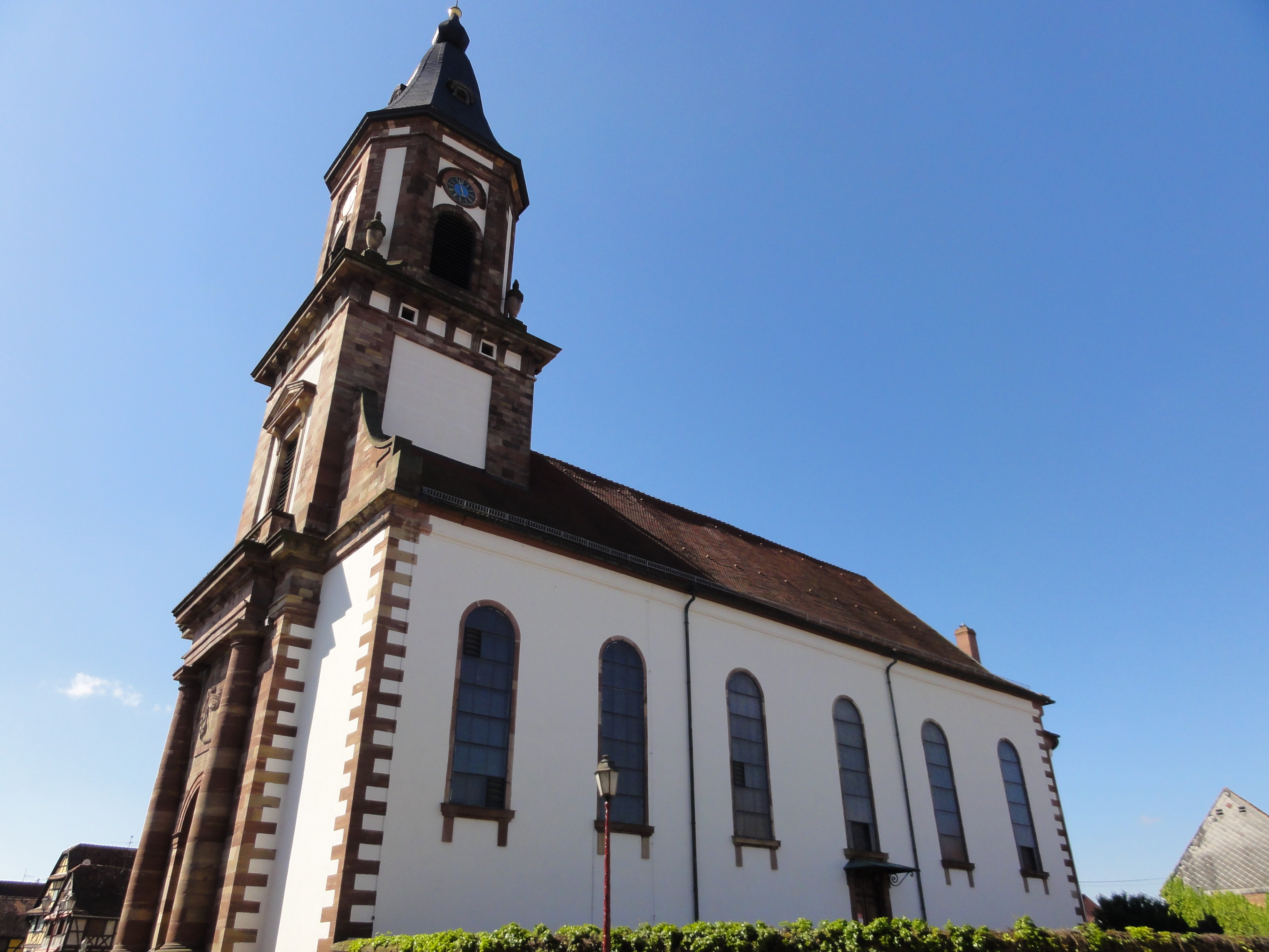 Alsace, Bas-Rhin, Weyersheim, Église Saint-Michel (PA00085235, IA00119652).